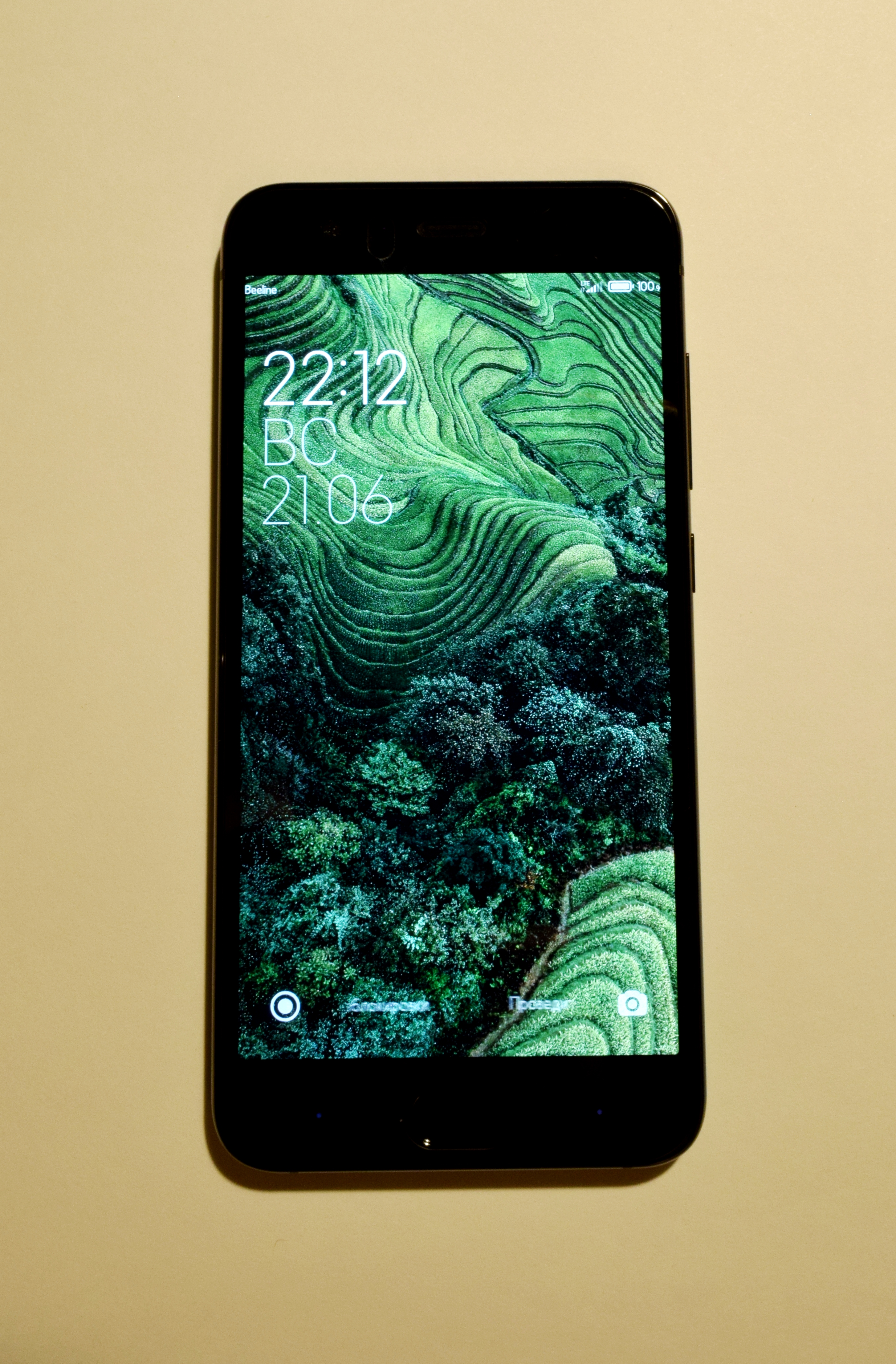 Смартфон